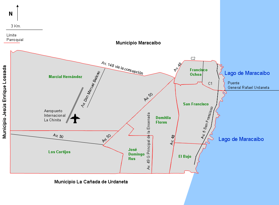 Mapa de las parroquias del Municipio San Francisco. Estado Zulia. Venezuela